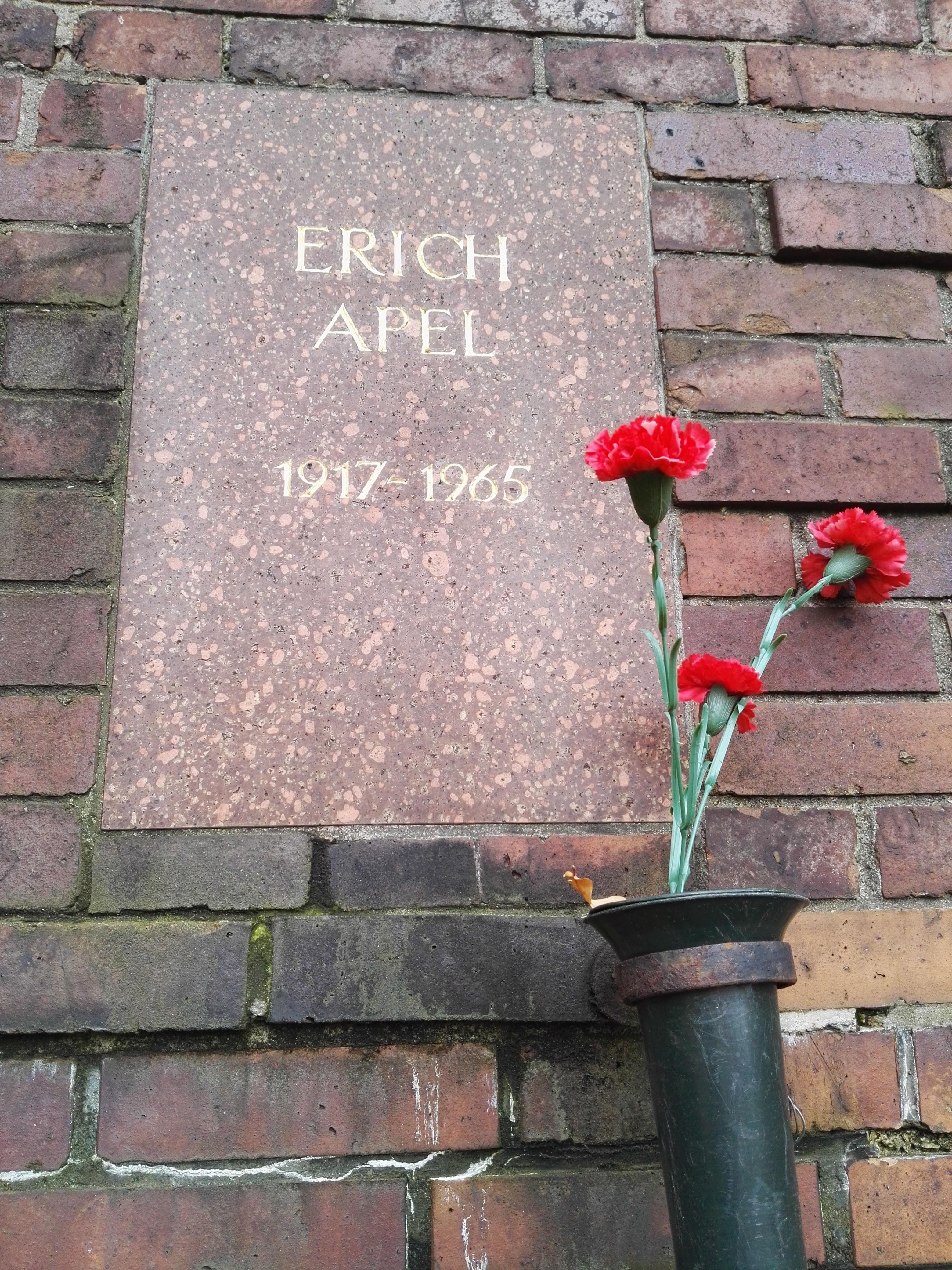 Grab von Erich Apel in der Gedenkstätte der Sozialisten auf dem Zentralfriedhof Friedrichsfelde in Berlin-Lichtenberg